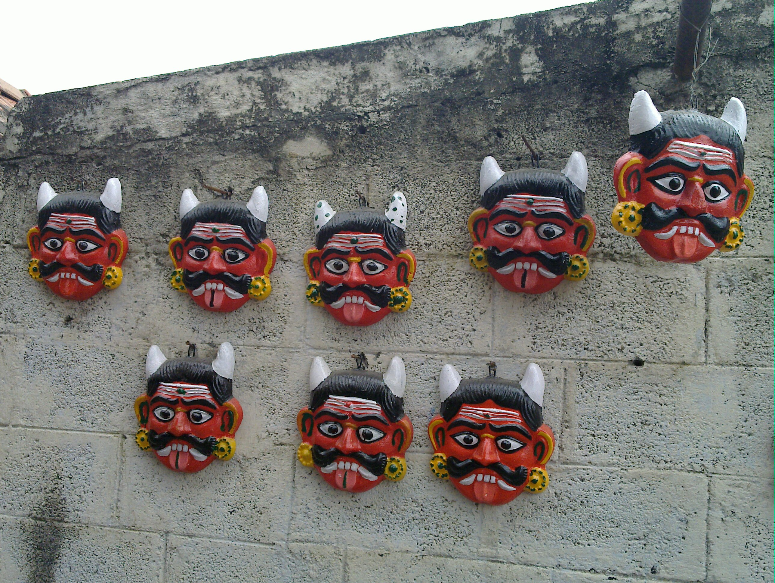 வீடு மற்றும் அலுவலகங்களின் முன் தொங்க விடப்படும் கண்ணேறு பொம்மைகள். இவற்றால் கண் திருஷ்டி கழியும் என்பது நம்பிக்கை